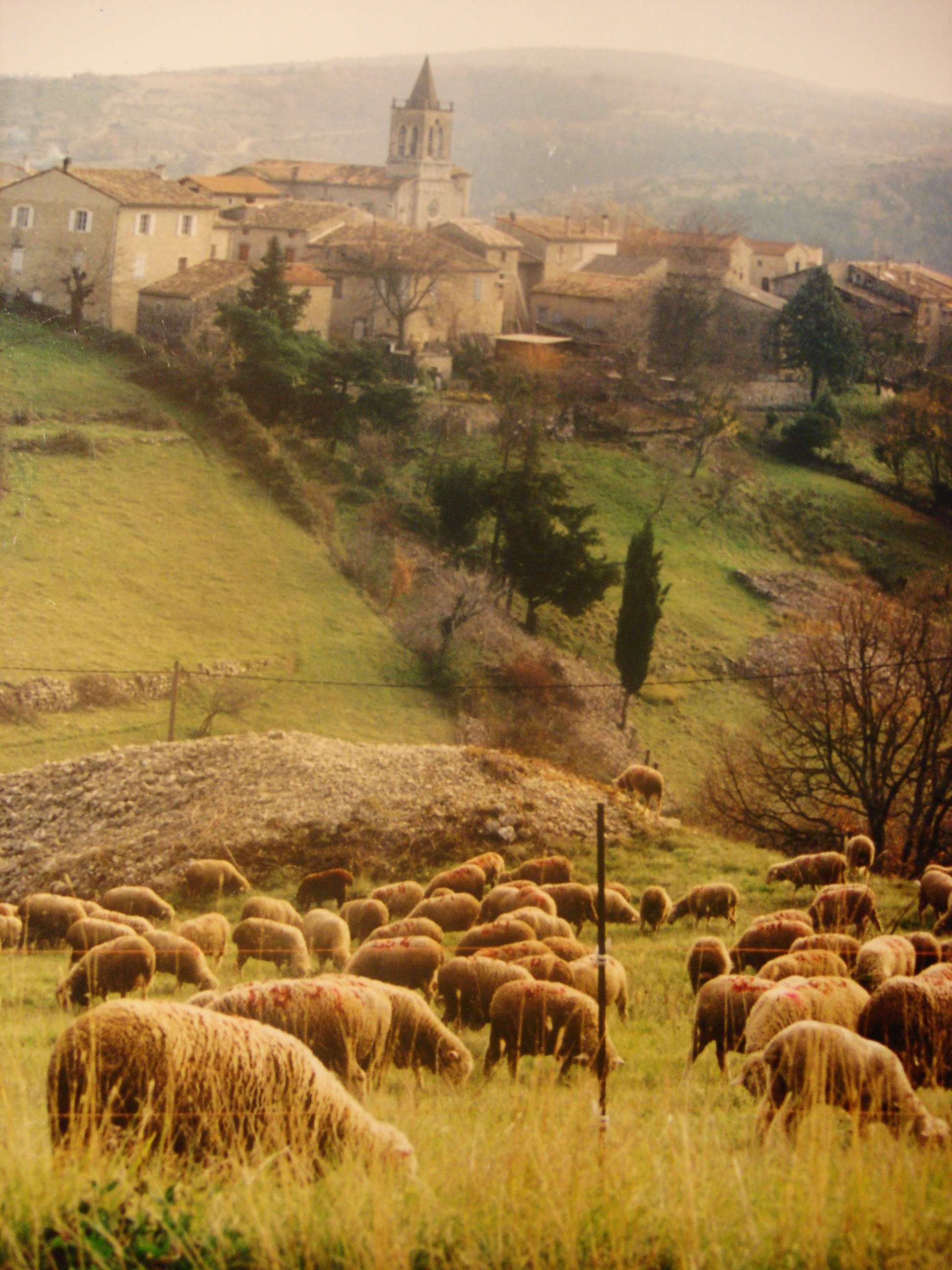 Vue générale de la Commune de "Saint-Andéol-de-Berg" - Ardèche (07) / France Auteur : Pierre Ribon - 17/11/1997 L'auteur autorise CUBALIBRE à publier l'image "Saint-Andéol-de-Berg (Ardèche - France).JPG" sur Wikipedia, sous la licence ci-dessous